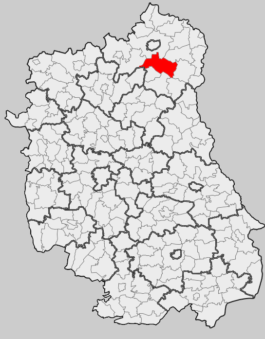 Map of gmina Łomazy, Biała Podlaska county, Lublin voivodship Mapa gminy Łomazy, powiat bialski, województwo lubelskie